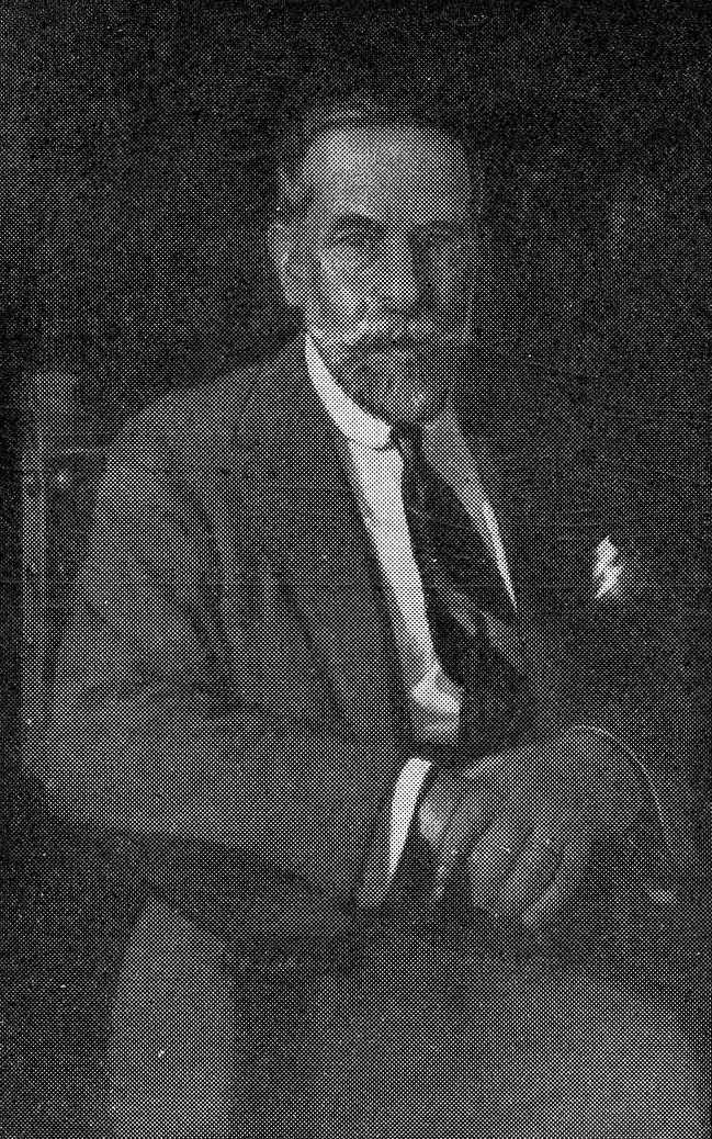 Casto Blanco Cabeza, fotografía en Vida Gallega 1929